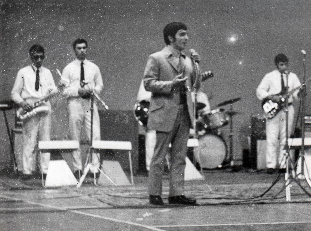 Фестиваль Золотая осень Баку 1969.